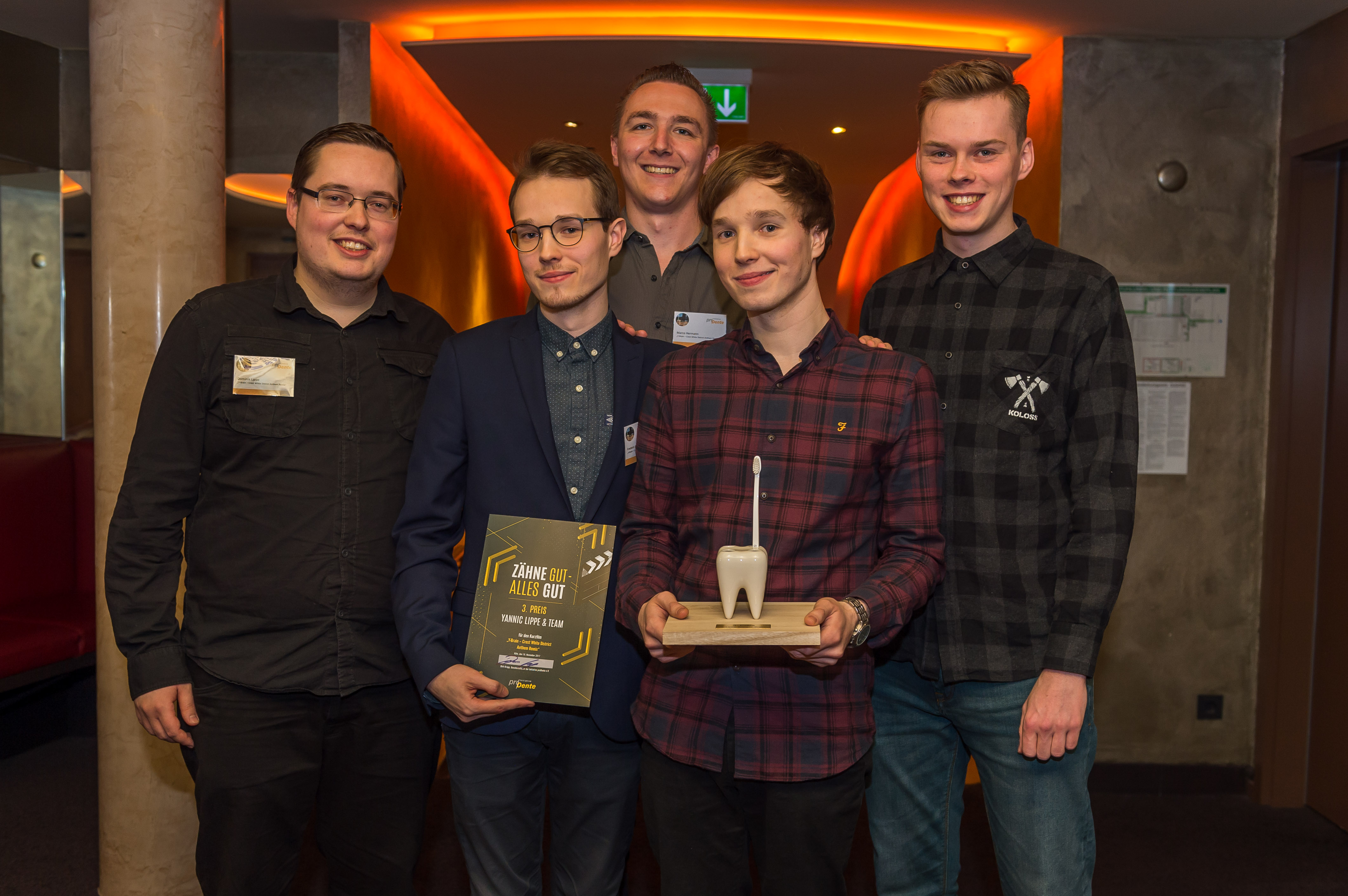 Yannic Lippe und Team beim Kurzfilmwettbewerb „Zähne gut - alles gut“